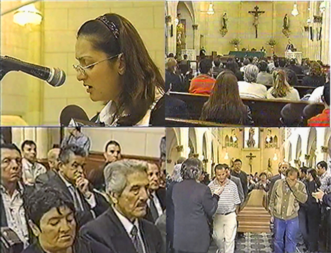 Funeral en la iglesia Santa Teresita de Bogotá, Hernando Casanova, actor colombiano fallecido en 2002